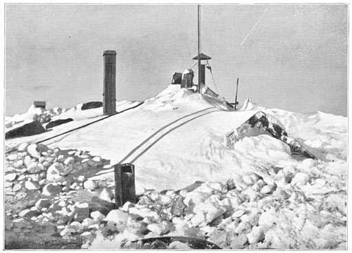 Aan de Zuidpool